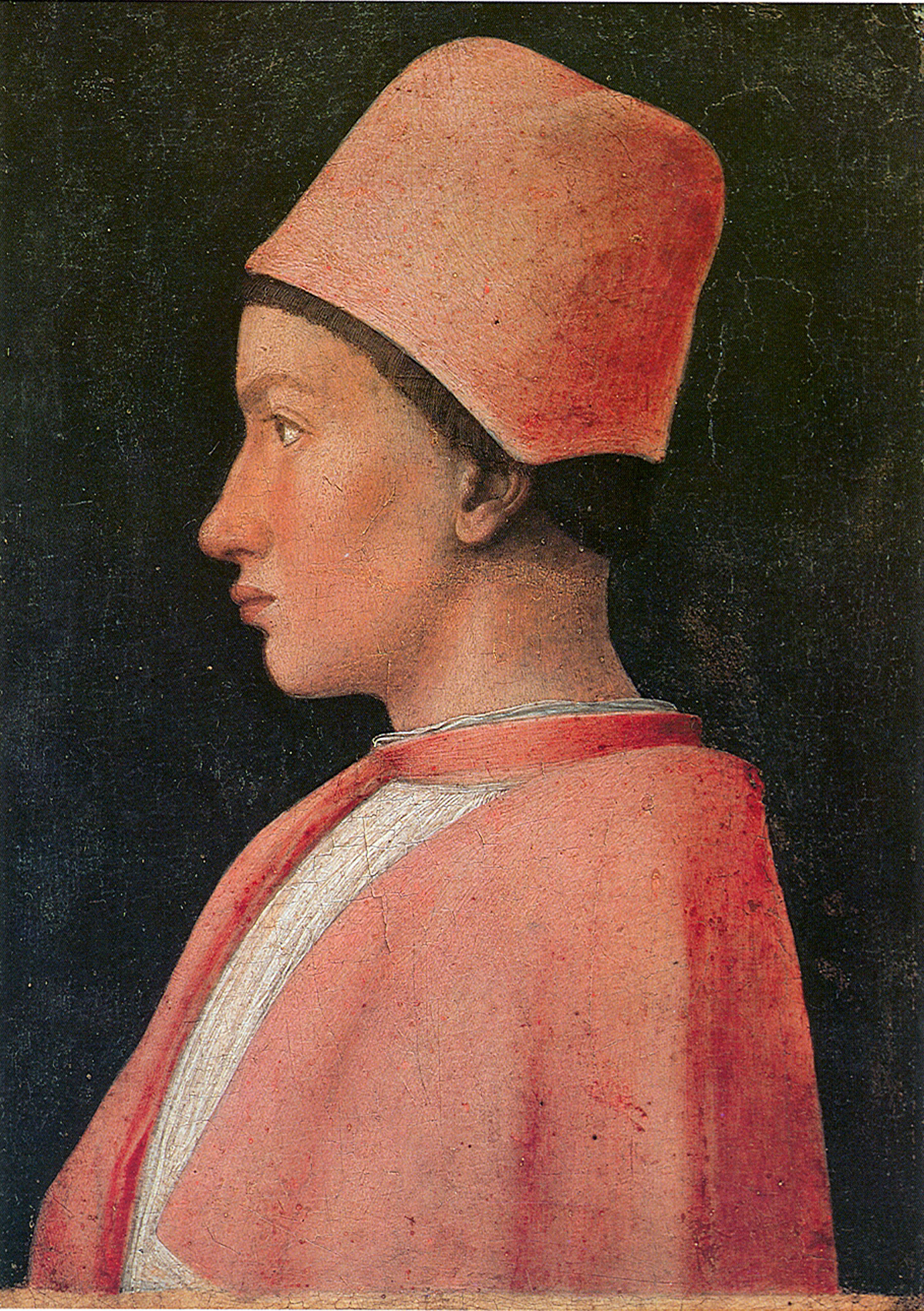 Potrebbe trattarsi di Francesco Gonzaga (1444-1483), figlio di Luigi III Gonzaga, che venne nominato cardinale all'età di 16 anni da parte di papa Pio II Piccolomini.